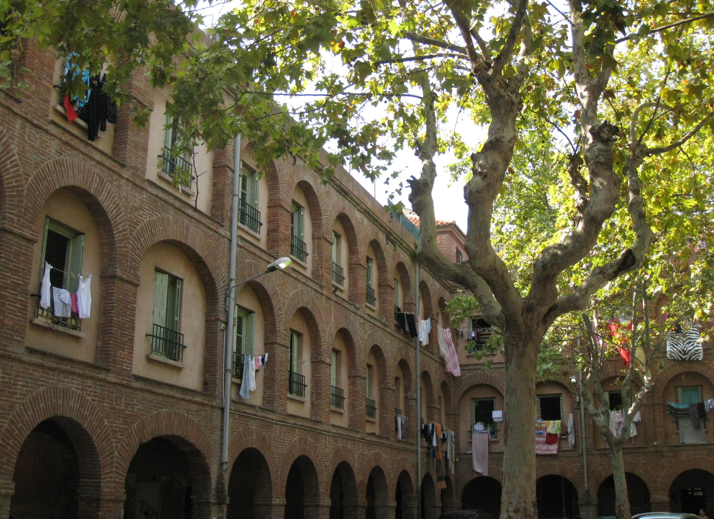 Caserna de Sant Jaume (Perpinyà), pati interior .